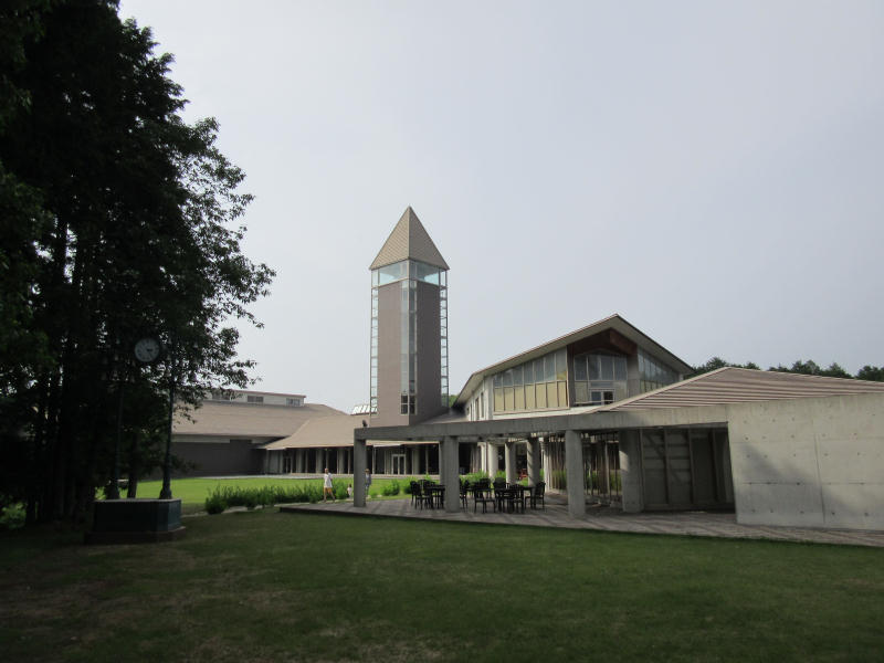 みのかも文化の森